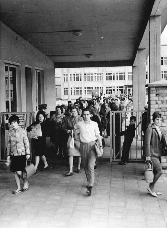 Frankfurt/Oder, VEB Halbleiterwerk, Schichtwechsel Zentralbild Stöhr 12.10.1964 In den fünf Jahren seines Bestehens hat sich der VEB Halbleiterwerk Frankfurt-Oder stürmisch entwickelt. Die Produktion des Halbleiterwerkes - Alleinhersteller von Transistoren und Gleuchrichtern in der DDR - verdoppelte sich sowohl im Umfang als auch wertmäßig und erreicht in diesem Jahr über 10 Millionen Bauelemnete mit einem Wert von 60 Millionen MDN. Die künftigen "Feldherren der Produktion", wie die Halbleiterbauelemente von Wissenschaftlern genannt wurden, ermöglichen die Automatisierung ganzer Produktionsprozesse. UBz: Schichtwechsel im VEB Halbleiterwerk Frankfurt-Oder.